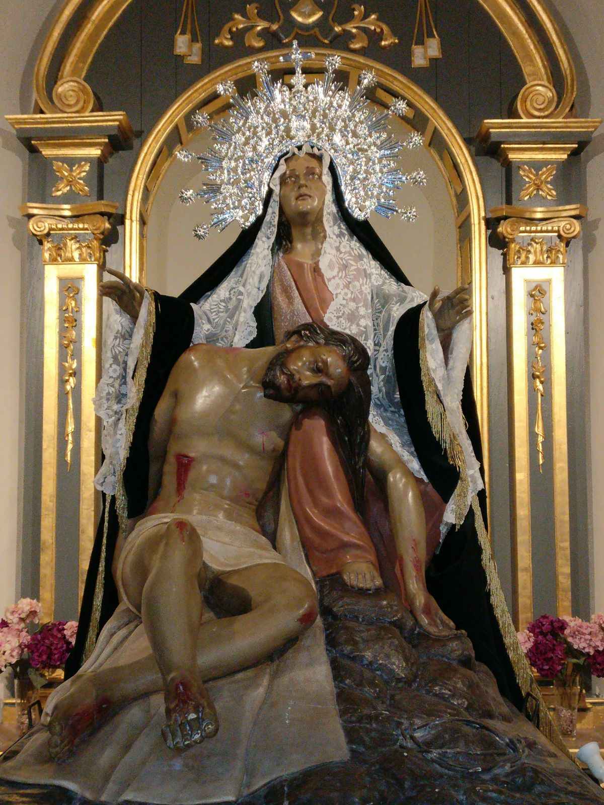 Imágen de la Stma Virgen de la Piedad